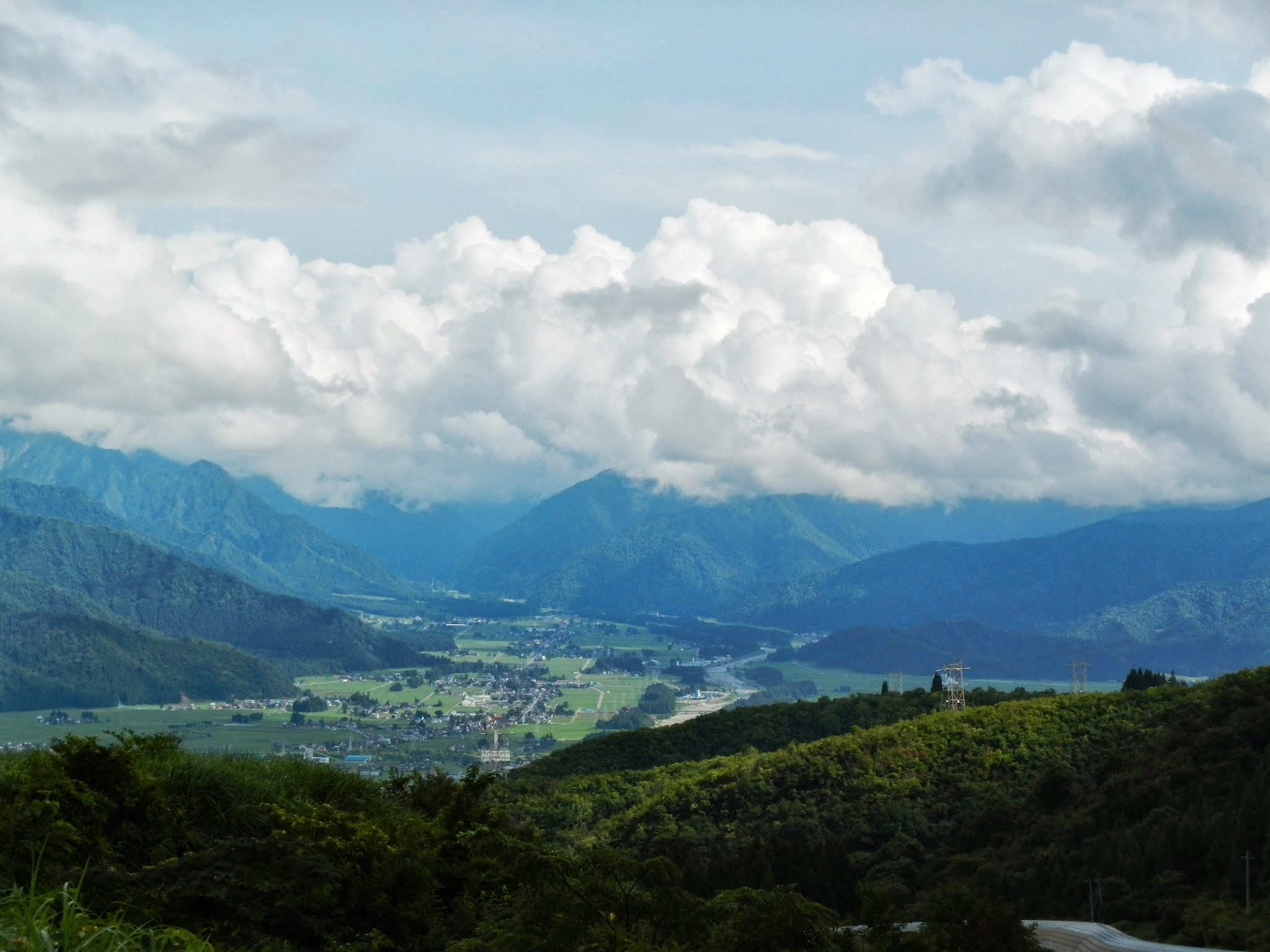 Minamiabuzaka, Tokamachi, Niigata Prefecture 948-0106, Japan